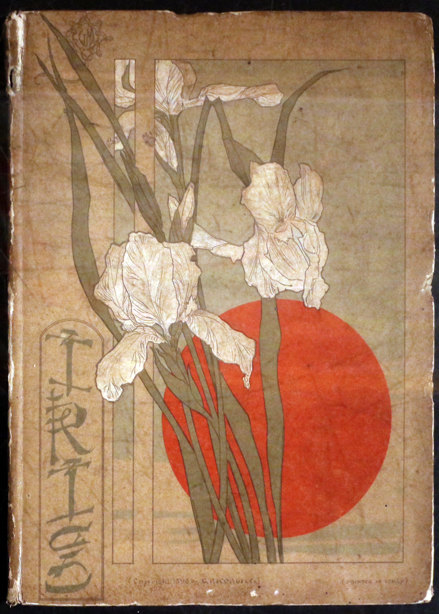 Il parco e i musei di Nervi This is a photo of a monument which is part of cultural heritage of Italy.